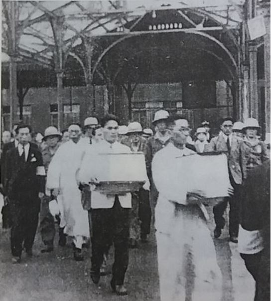 三义士遗骸移除会场